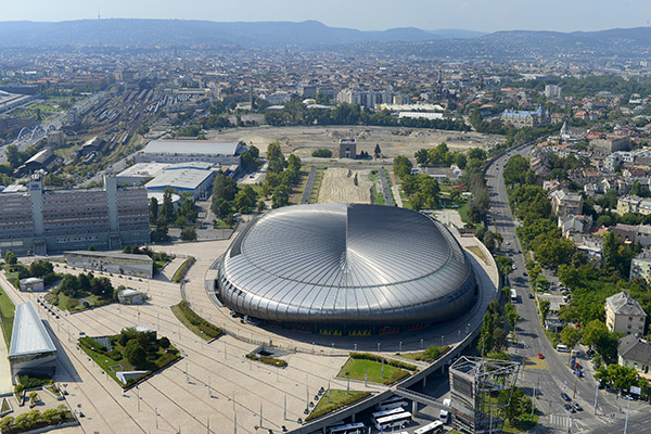 Papp László Budapest Sportaréna látképe a magasból